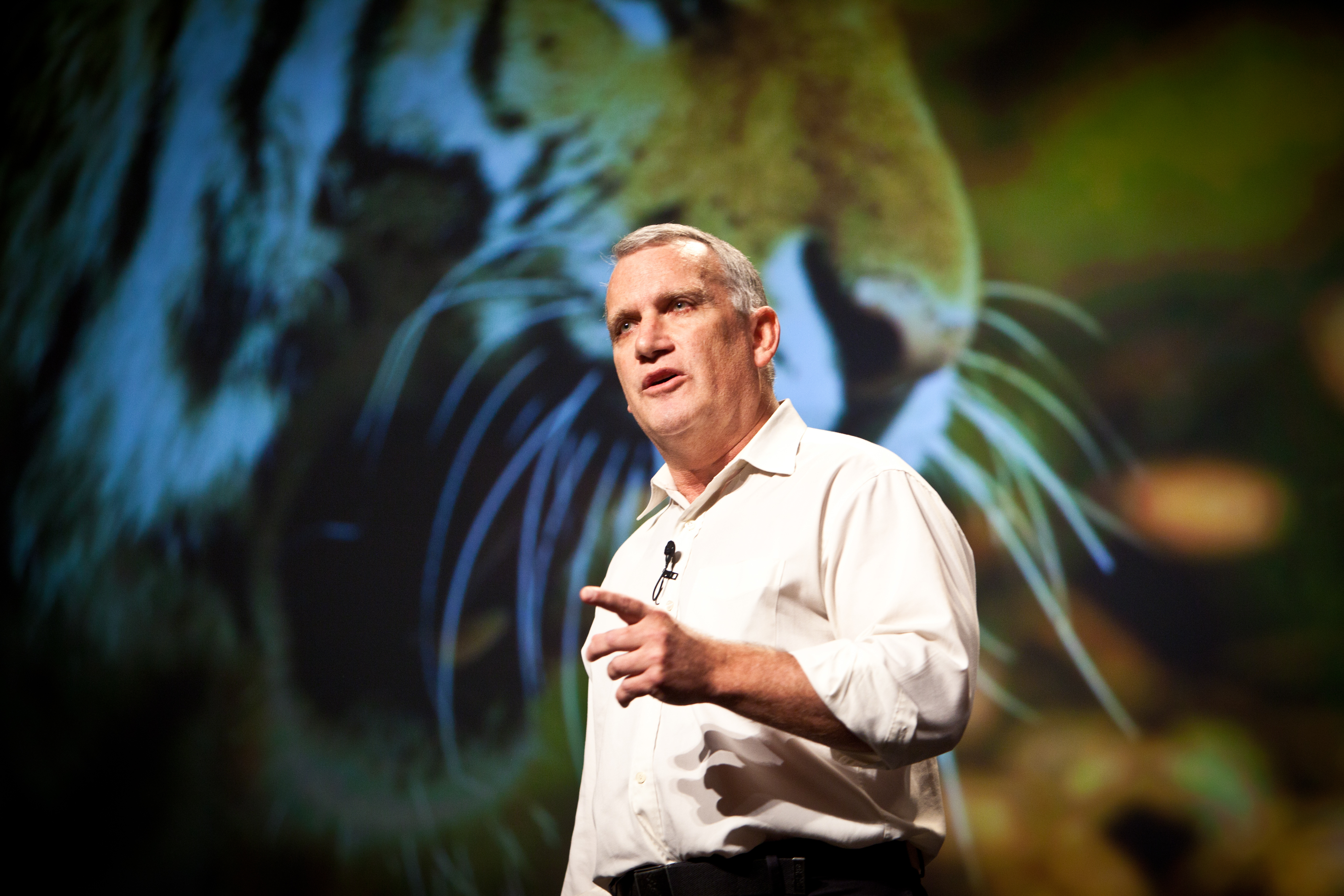 Photo: Kris Krüg